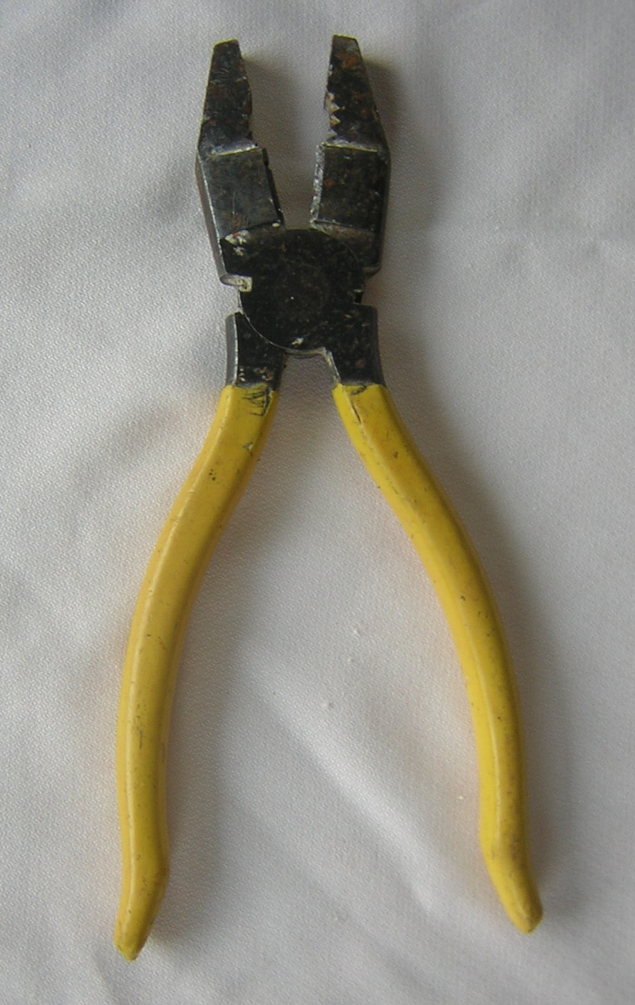 Alicate nasales